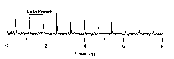 PSR B0329+54 pulsarından elde edilen darbeleri göstermektedir. Darbeler arasındaki zaman dilimi darbe periyodu olarak adlandırılır. Görüldüğü gibi darbeler hem biçim hem de genlik (büyüklük) olarak birbirlerinden oldukça farklı.